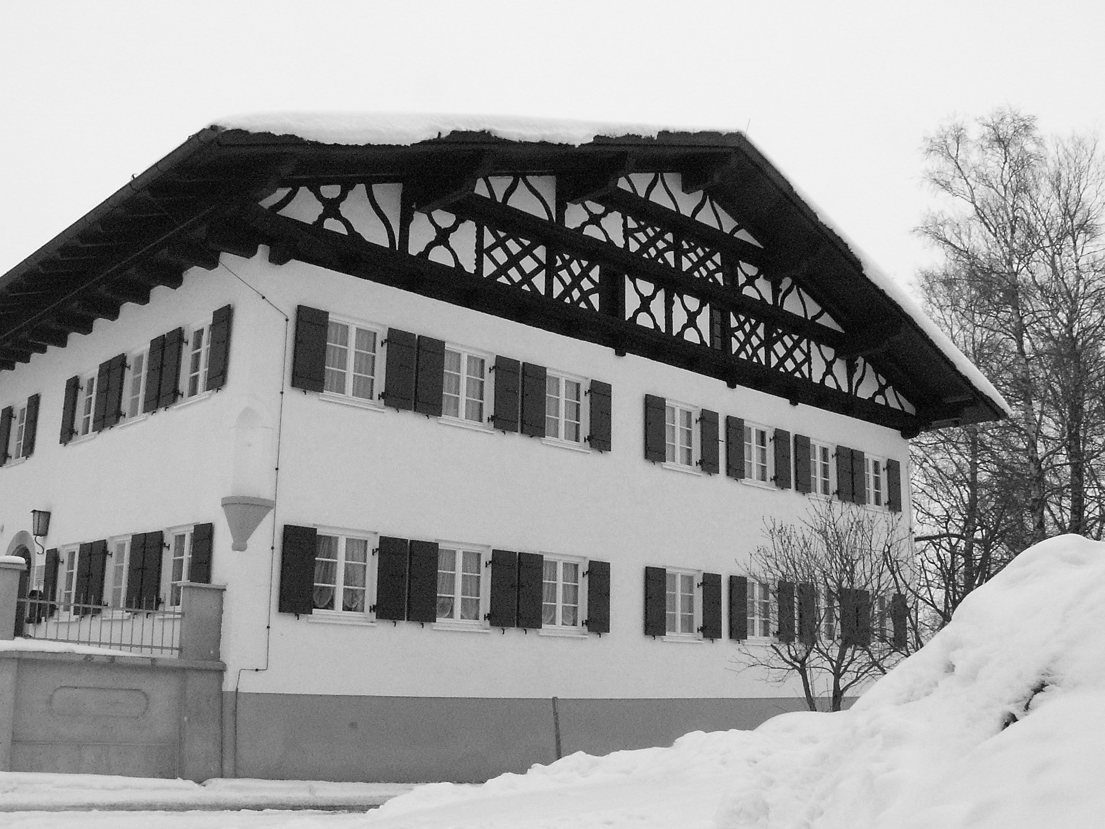 Pfarrhof in Seeg